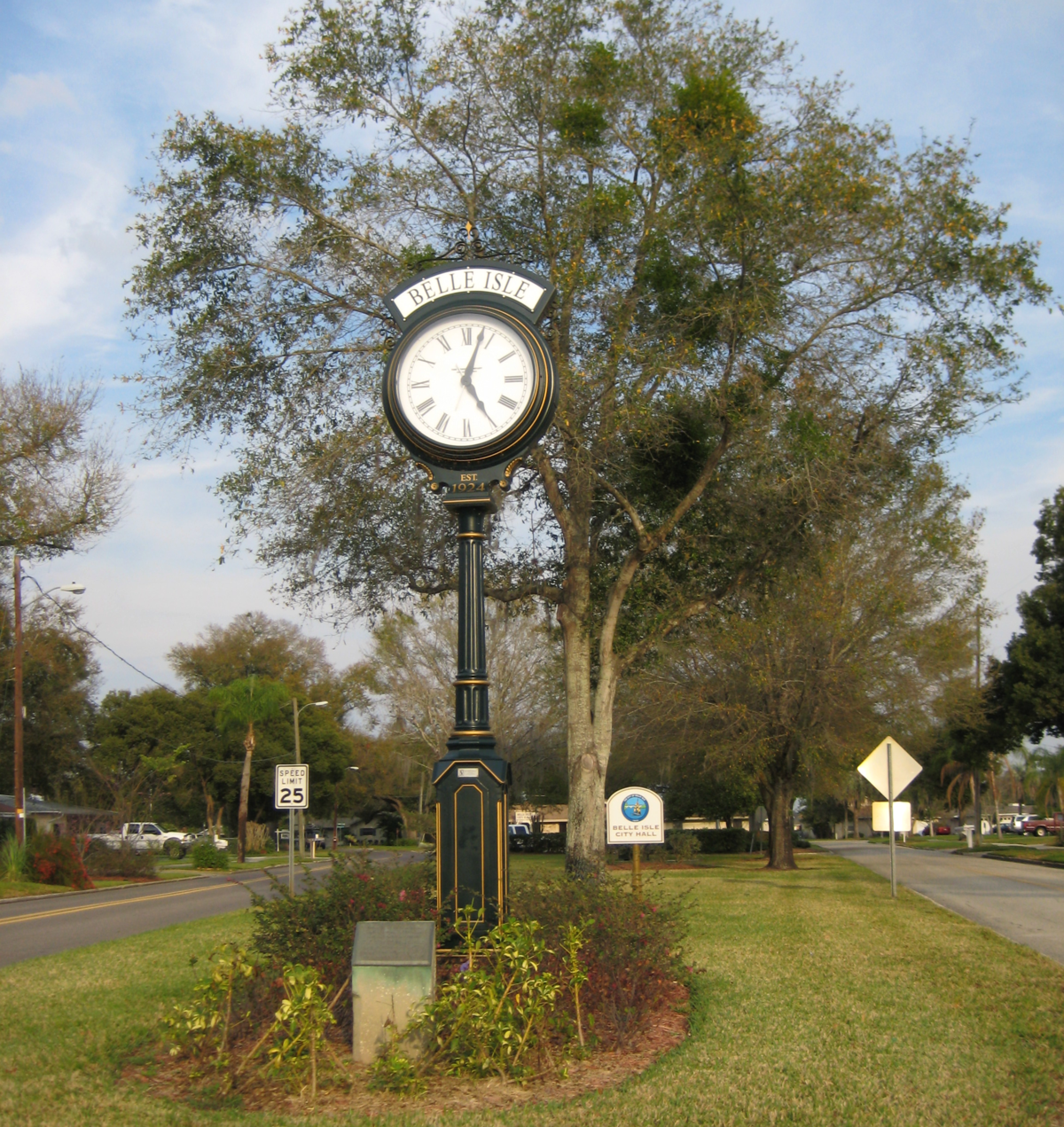 landmark in Belle Isle, Florida